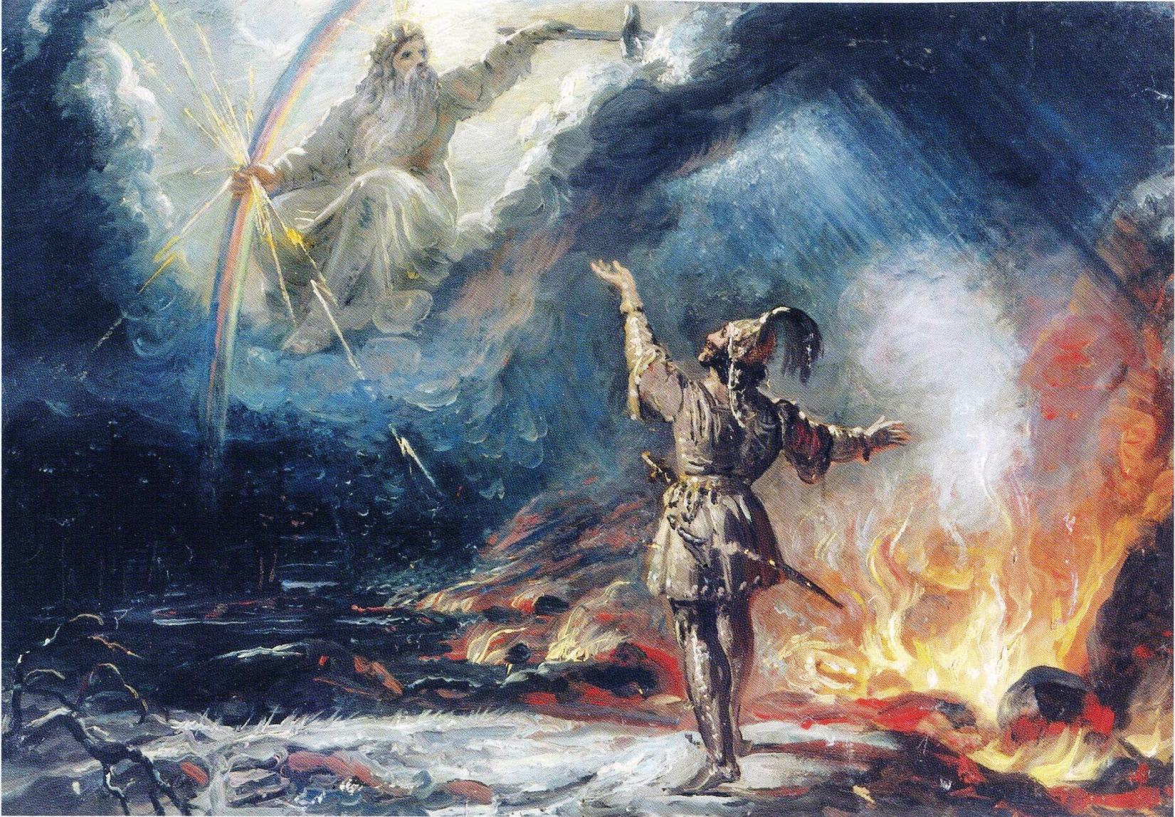 Robert Wilhelm Ekmanin luonnos Kalevala-aiheiseen maalaukseen Lemminkäinen tulisella järvellä. Lemminkäinen pyytää Ukko ylijumalalta apua tulisen järven ylittämiseen matkalla Pohjolan häihin.